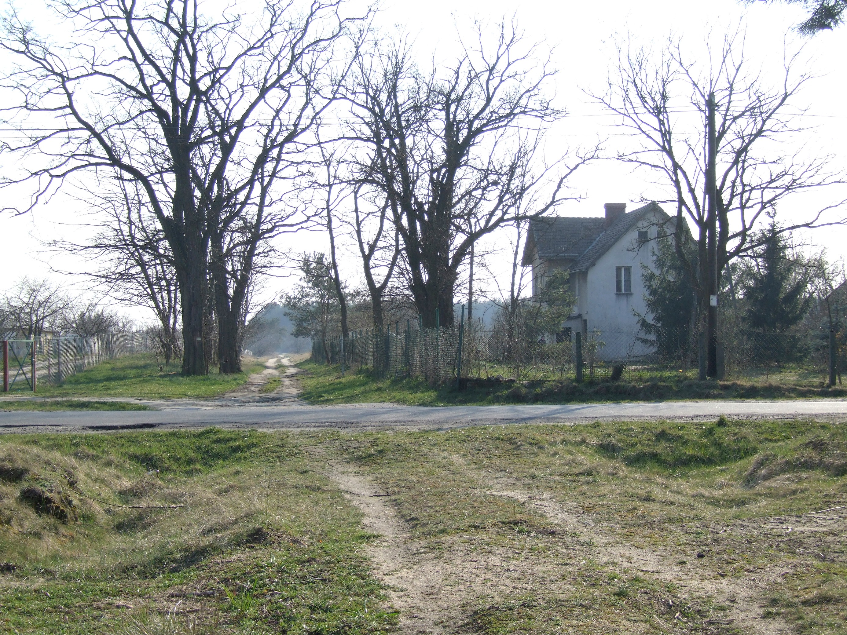 Dworzec dawnej kolei szprotawskiej w Ochli pod Zieloną Górą Autor: Mohylek 14:11, 27 March 2007 (UTC)